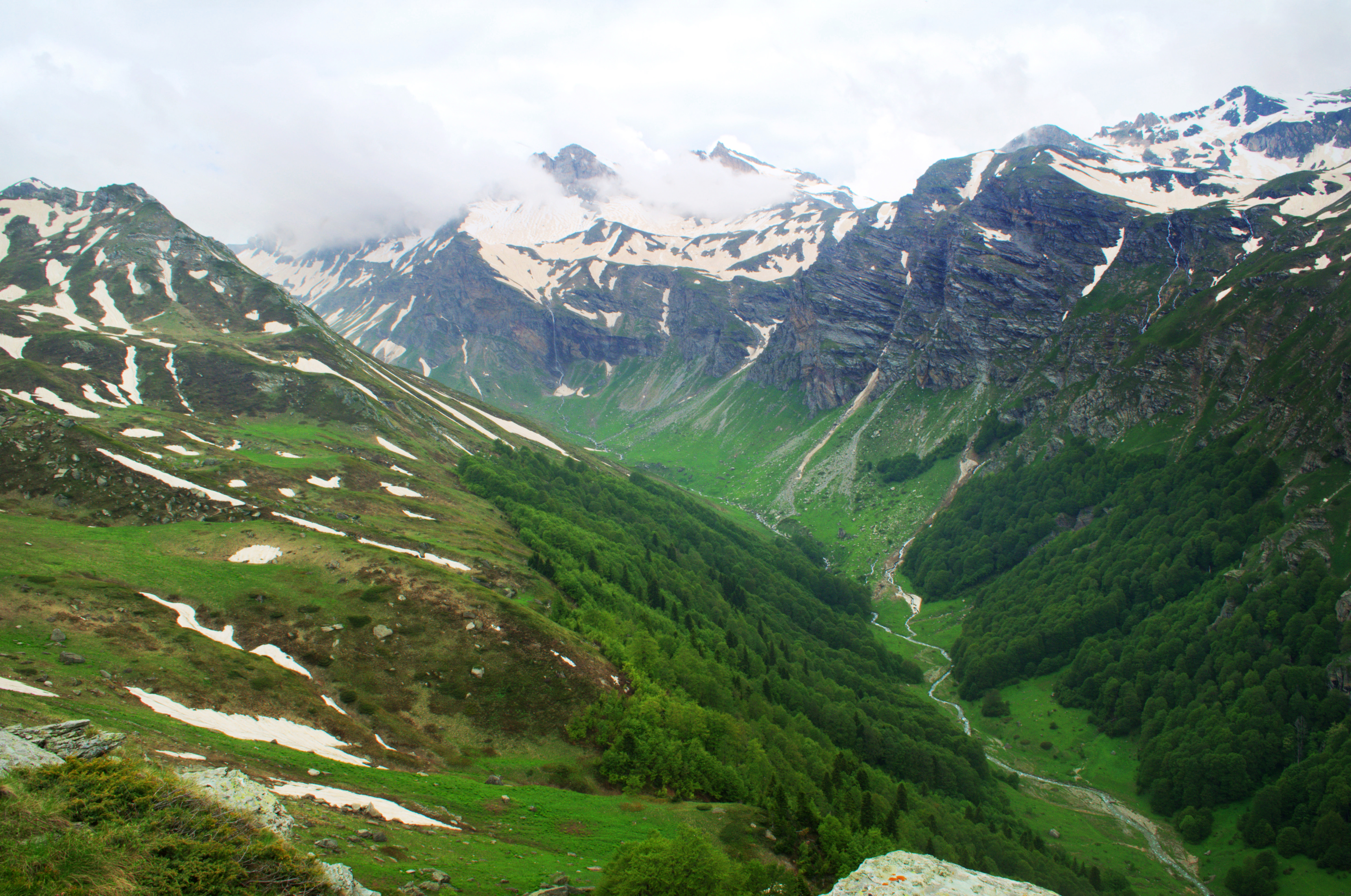 Фотографија од долината на Длабока река и Корабски водопад, дел од Национален парк „Маврово“